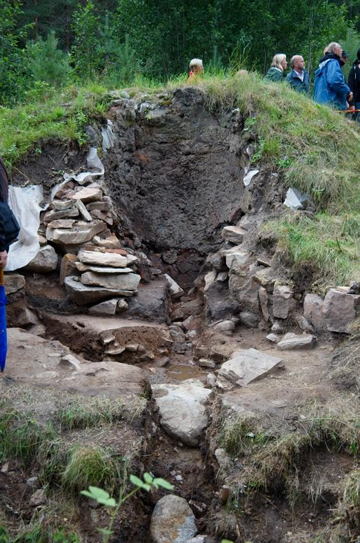 Karbenning 22:1. Vid en arkeologisk utgrävning norr om byn Olsbenning i Norbergs kommun, på en plats som sedan länge varit känd i folkmun som "Lapphyttan", frilades under slutet av 1970-talet en komplett medeltida järnframställningsplats. Masugnsruinen. Motiv: Karbenning 22:1 Kategori: Besökare, Hyttlämning Karbenning 22:1. Vid en arkeologisk utgrävning norr om byn Olsbenning i Norbergs kommun, på en plats som sedan länge varit känd i folkmun som "Lapphyttan", frilades under slutet av 1970-talet en komplett medeltida järnframställningsplats. Masugnsruinen. Karbenning 22:1.